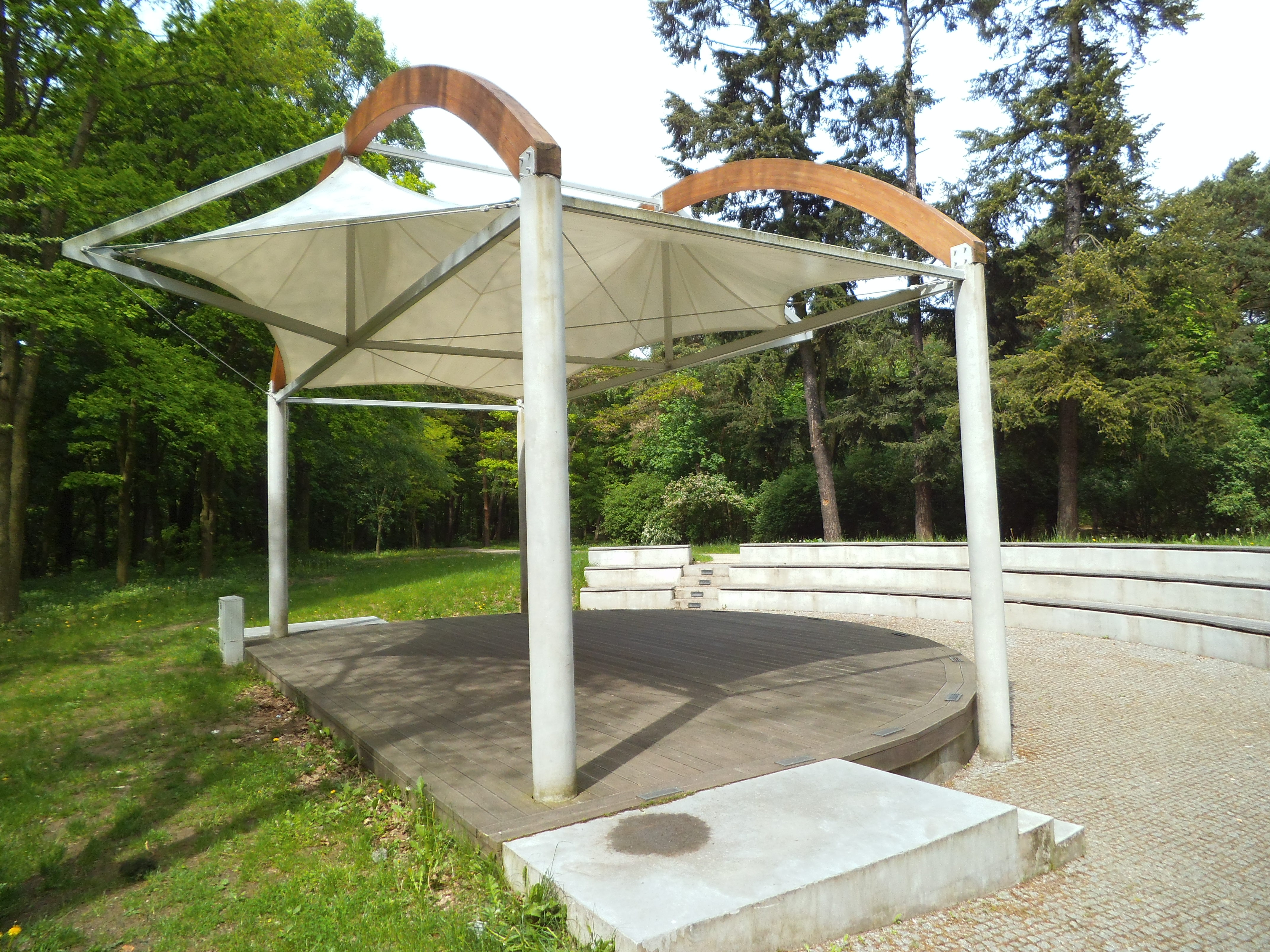 Mała architektura w Parku Miejskim w Toruniu